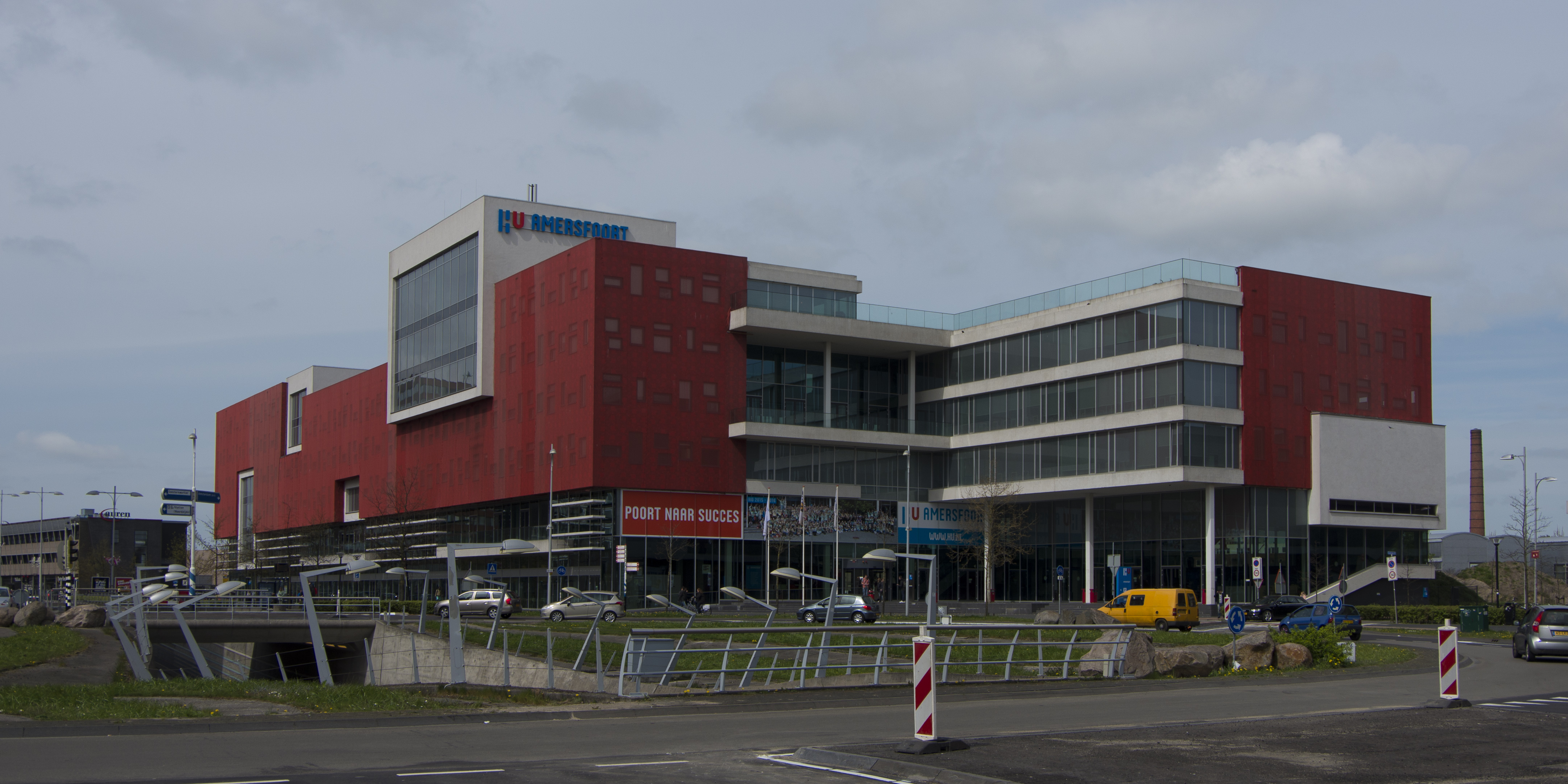 Vestiging Amersfoort van Hogeschool Utrecht, aan De Nieuwe Poort